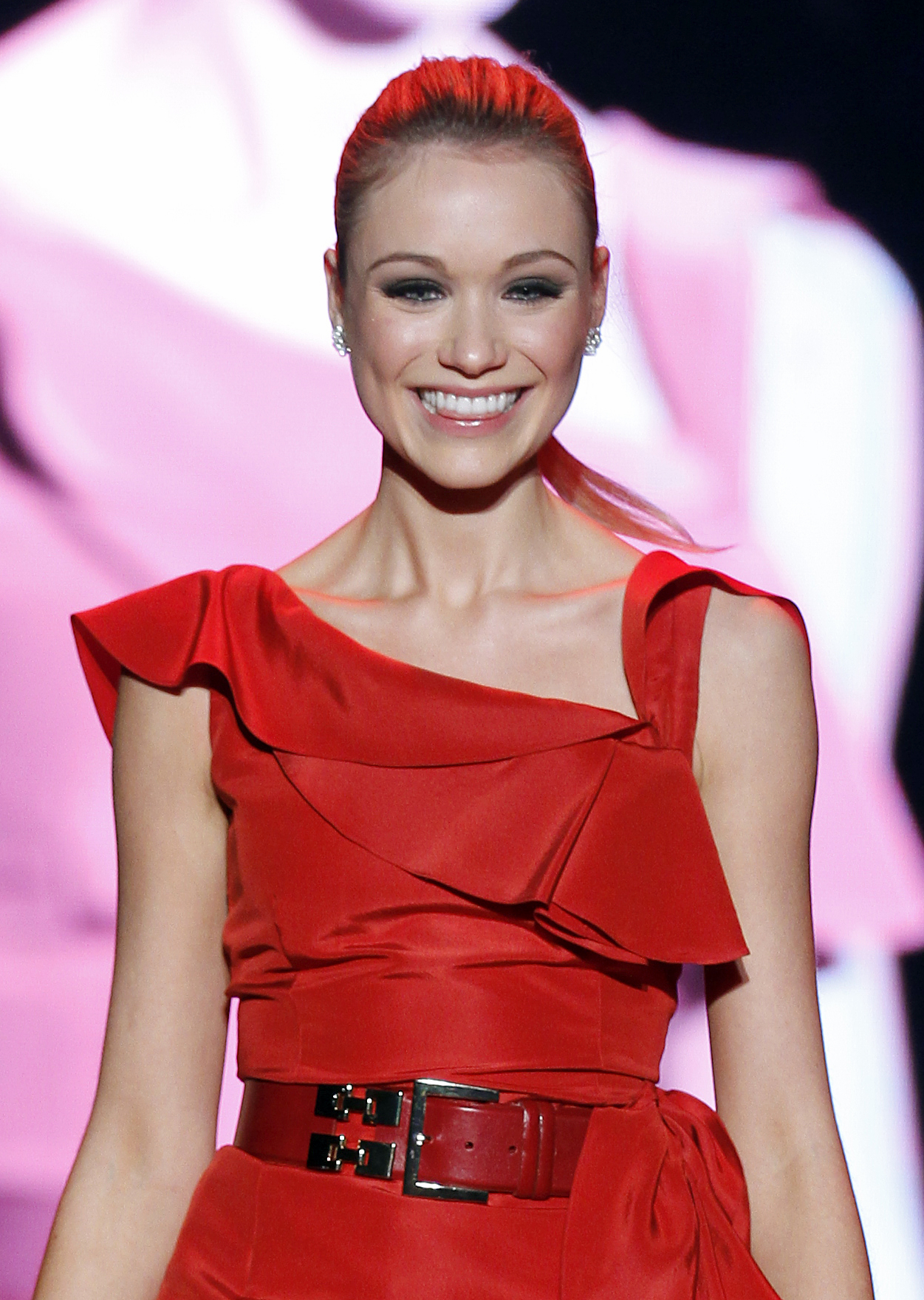 Katrina Bowden in Oscar de la Renta.